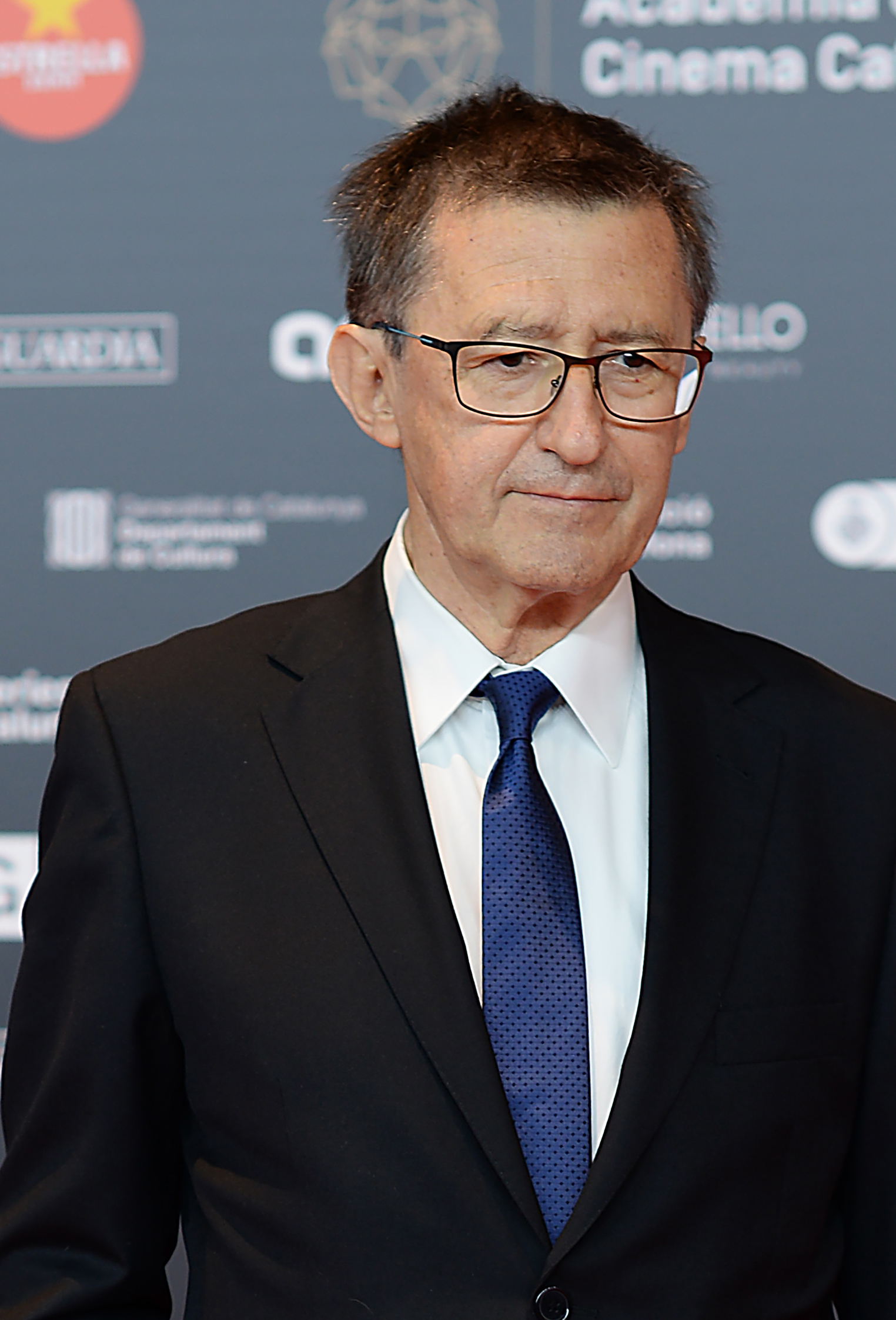 Francesc Betriu, director de cinema, XII Premis Gaudí (2020)